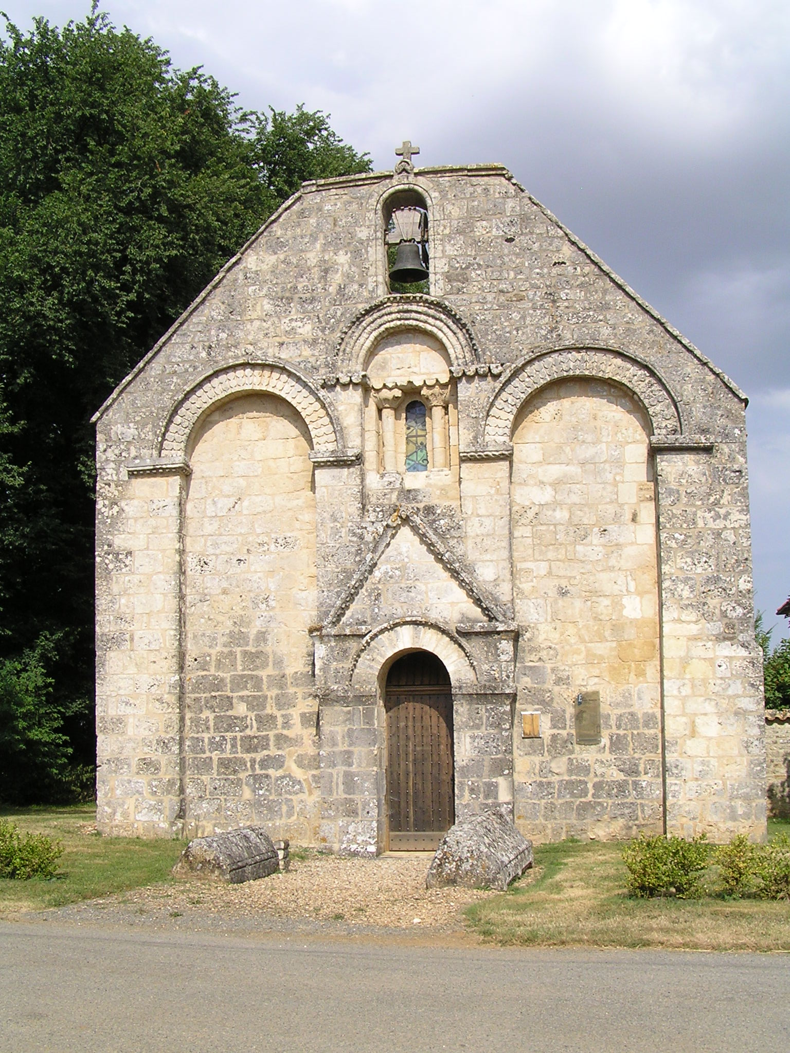 église de La Magdeleine, Charente, France